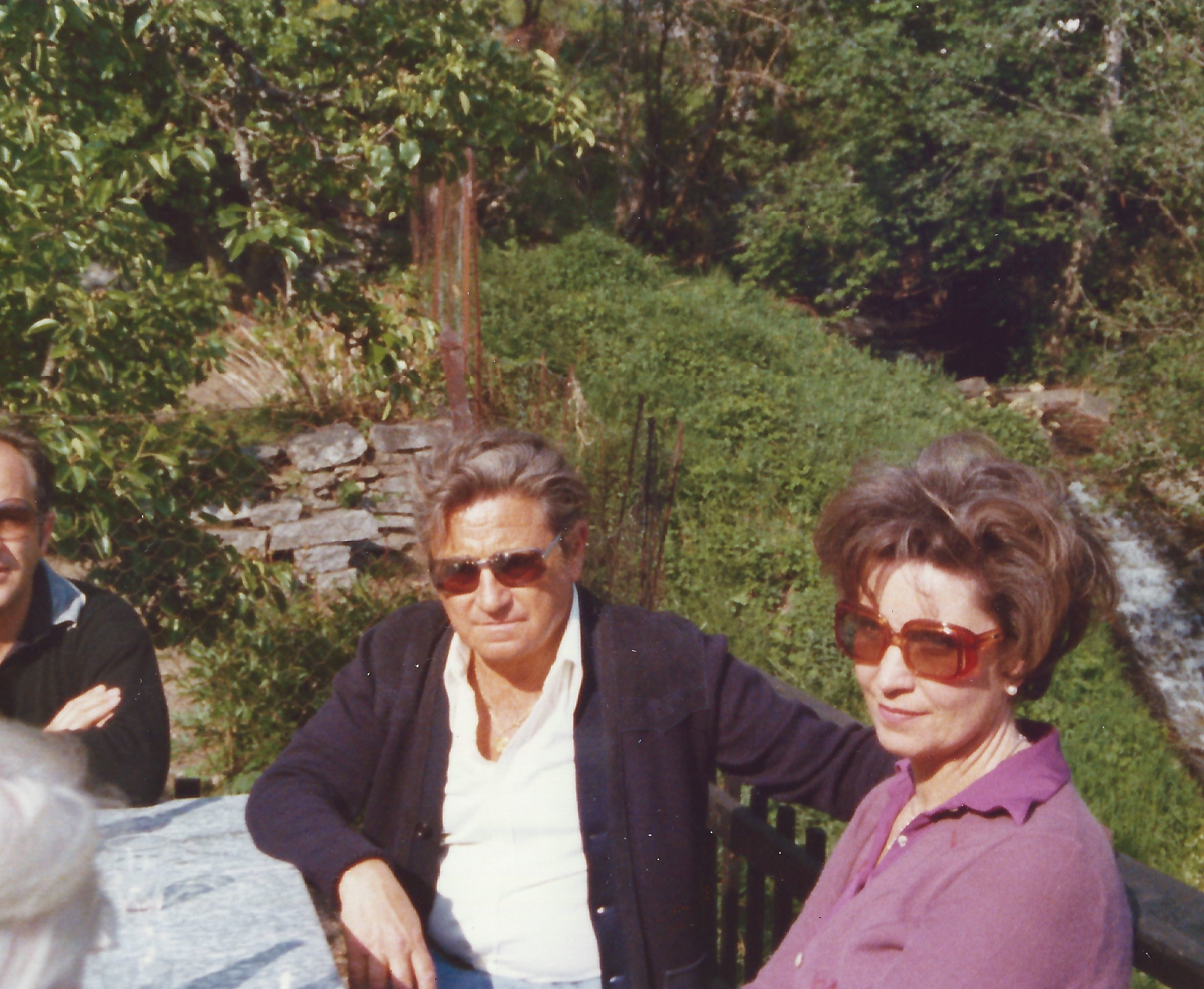 Alberto e Livia Stefani nel 1976